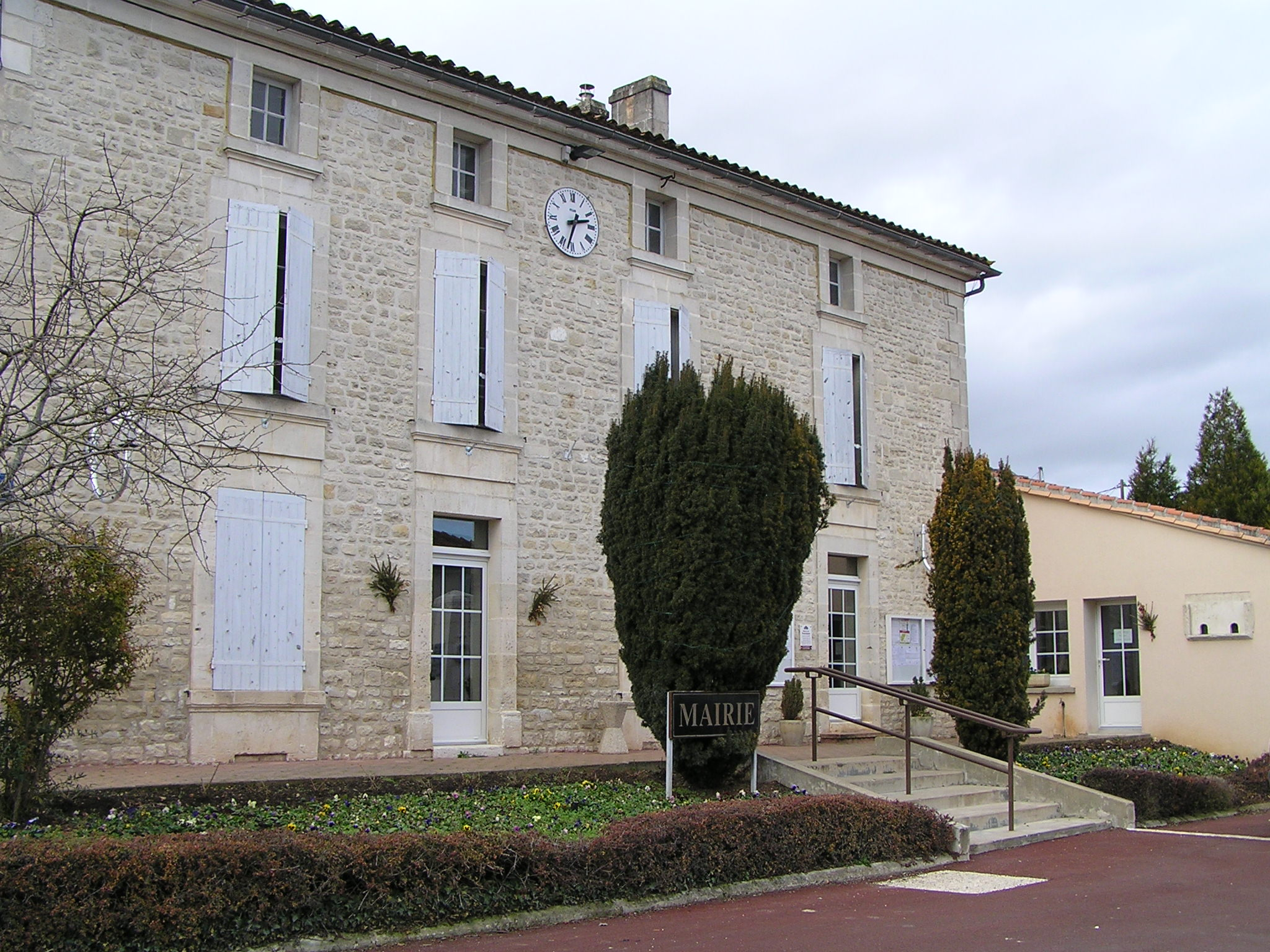 mairie de Foussignac